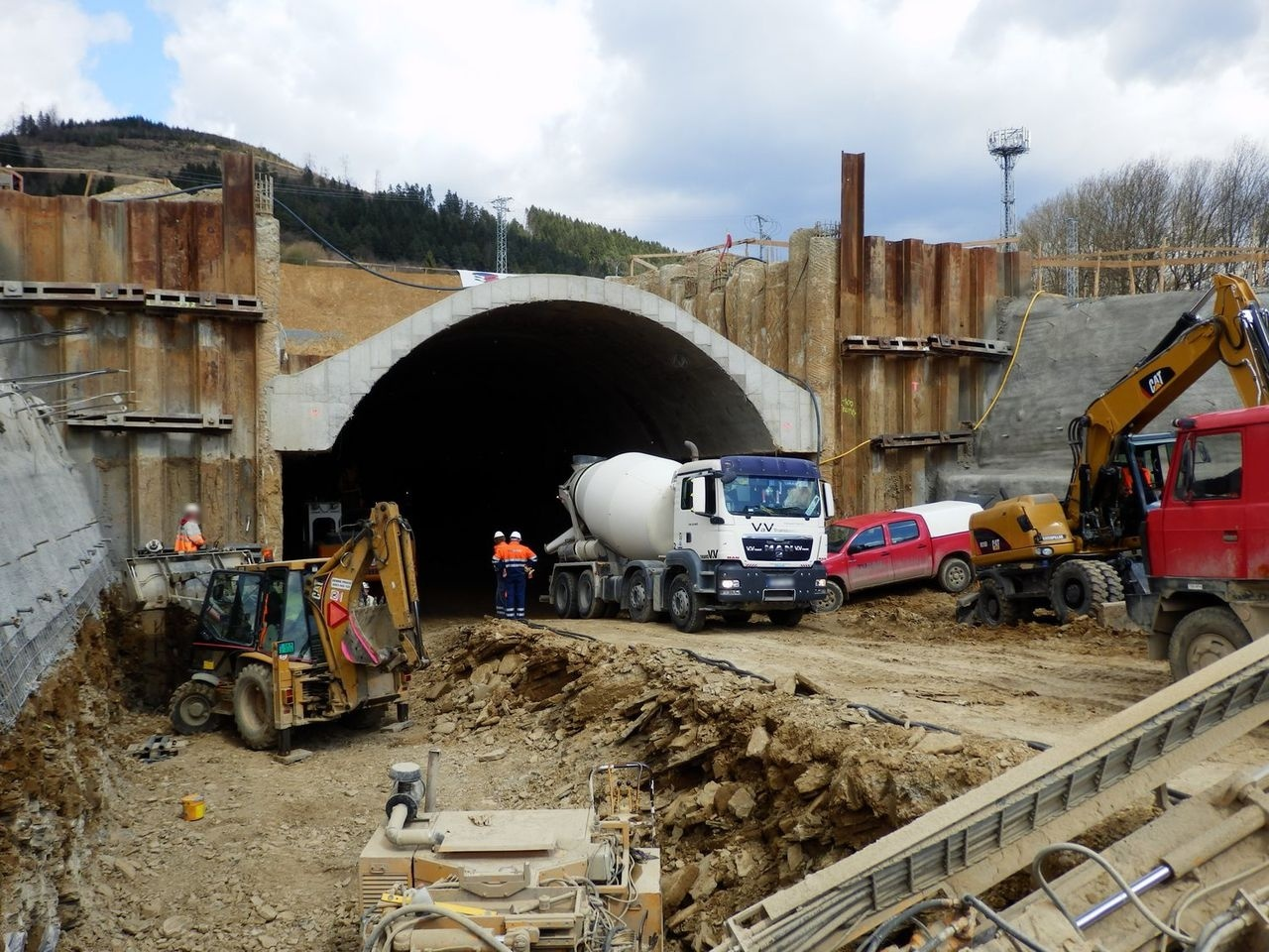 povazsky